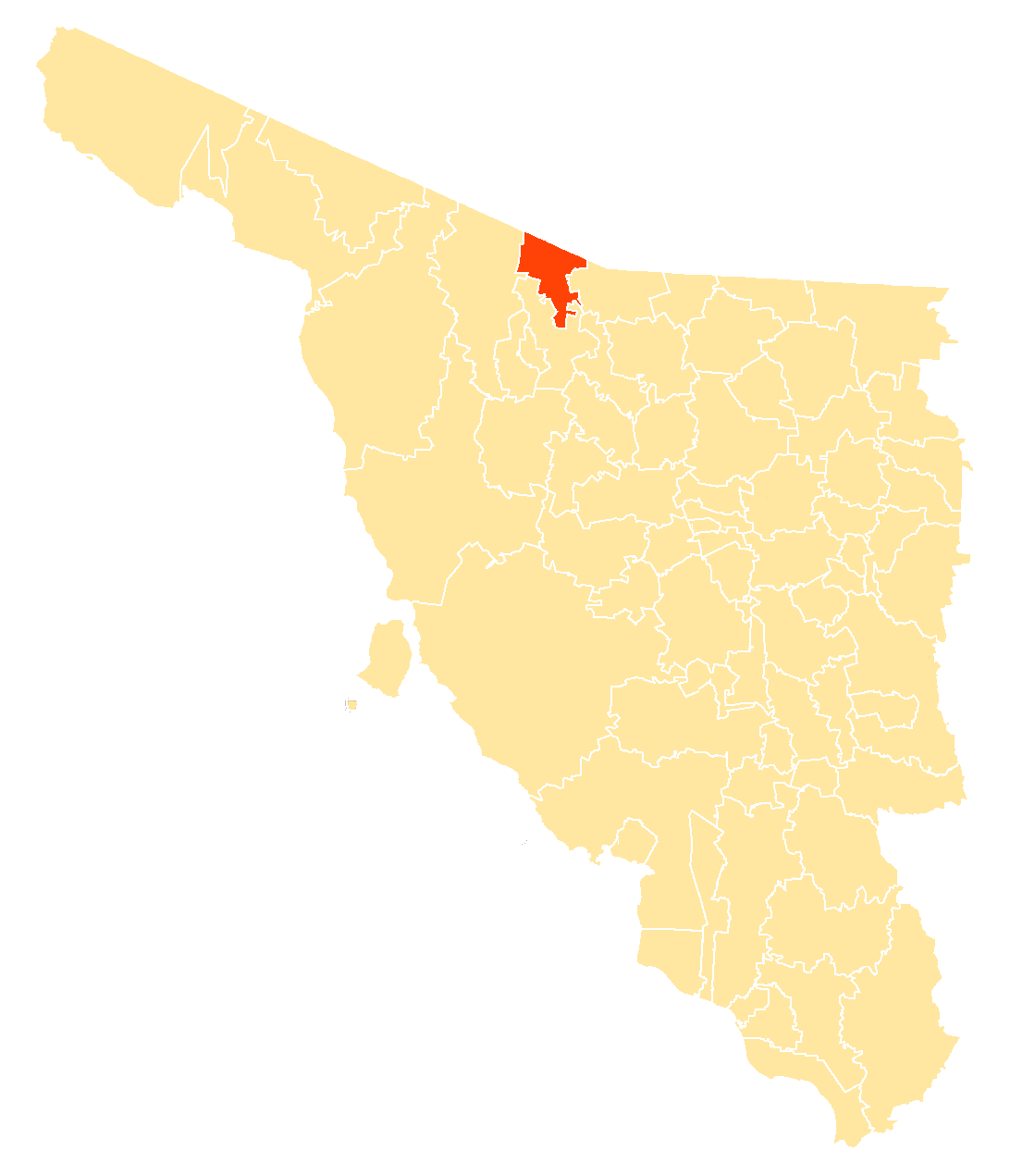 Municipio de Sonora, México.